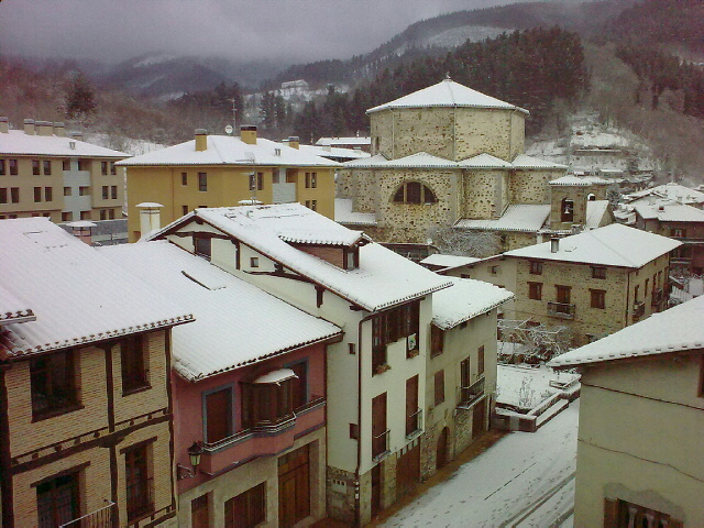 Aramaioko Ibarraren ikuspegia, 2010ean.